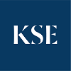 Новий логотип Київської школи економіки